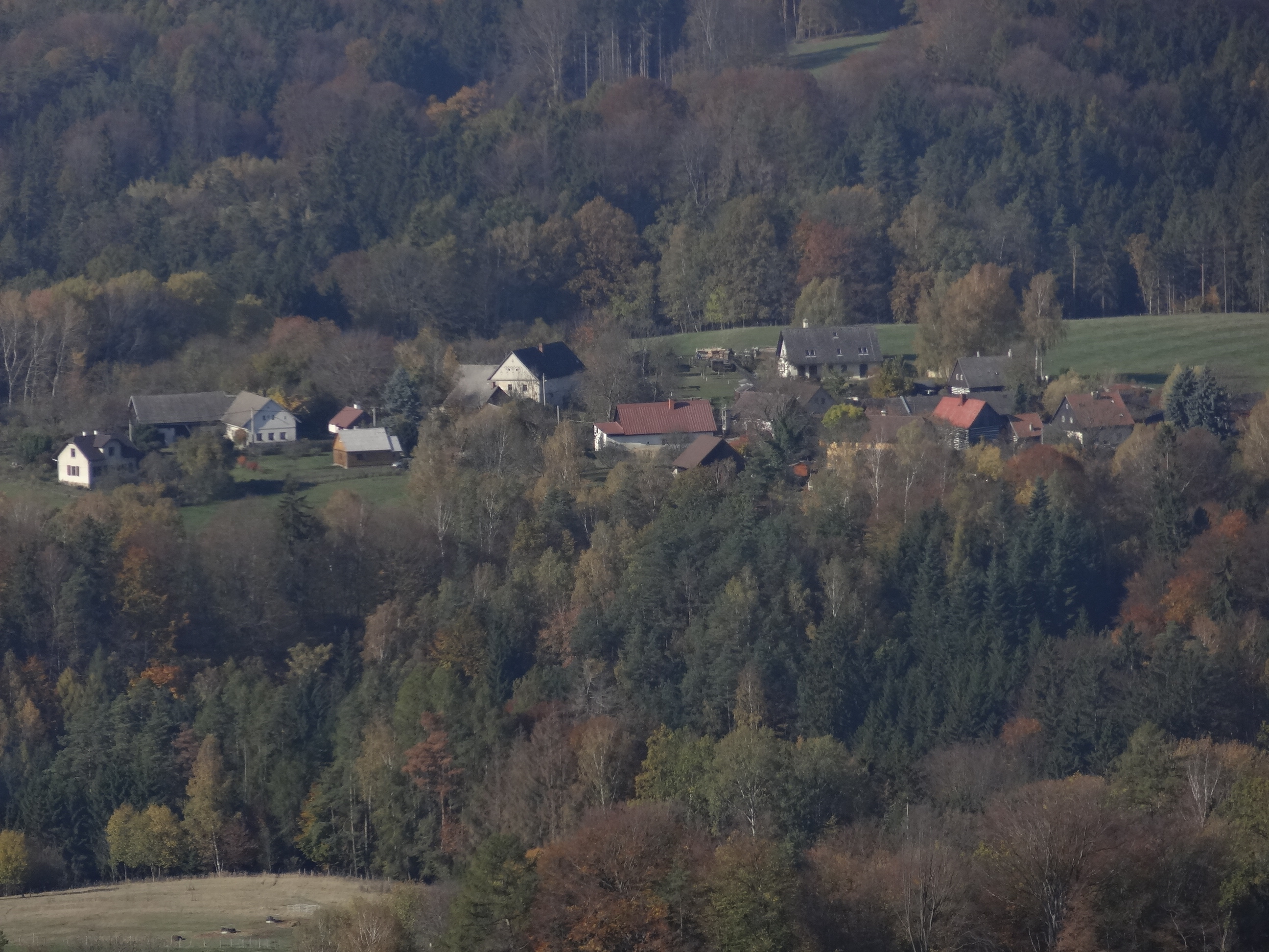 Bohuslav (u Hrubé Skály) z vyhlídky na trosecké Babě